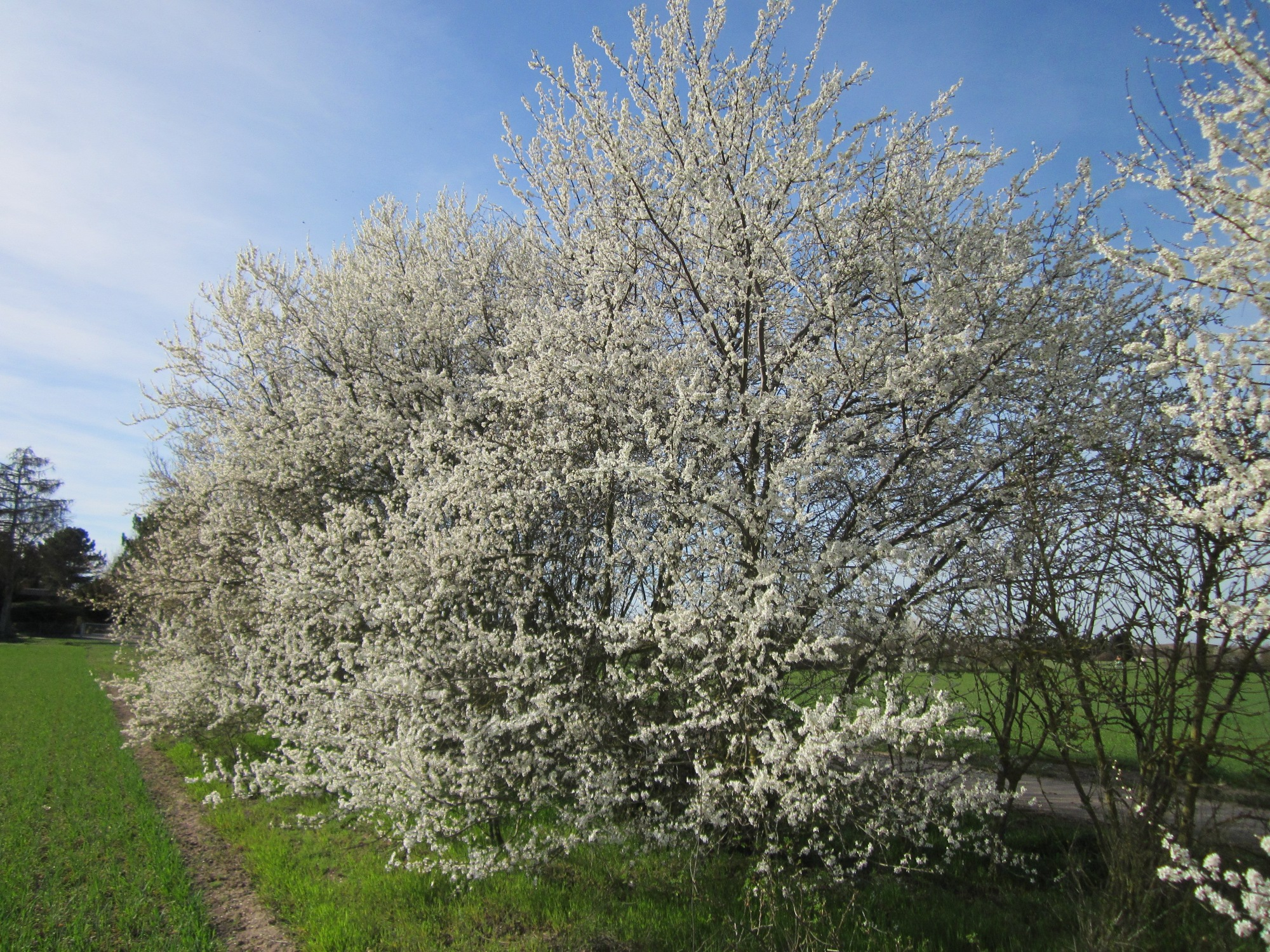 Kirschpflaume (Prunus cerasifera) bei Reilingen